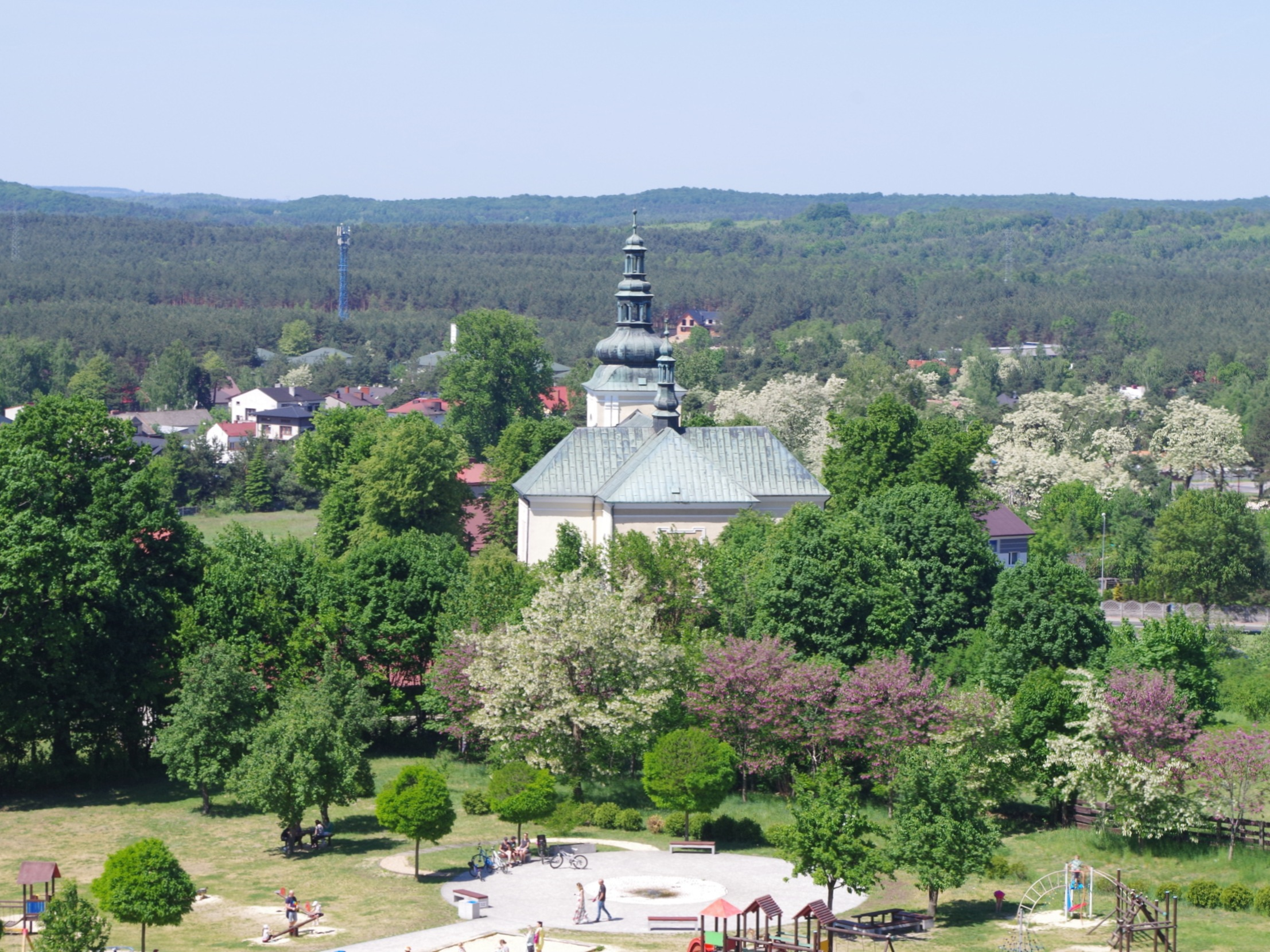 Olsztyn, widok ogólny